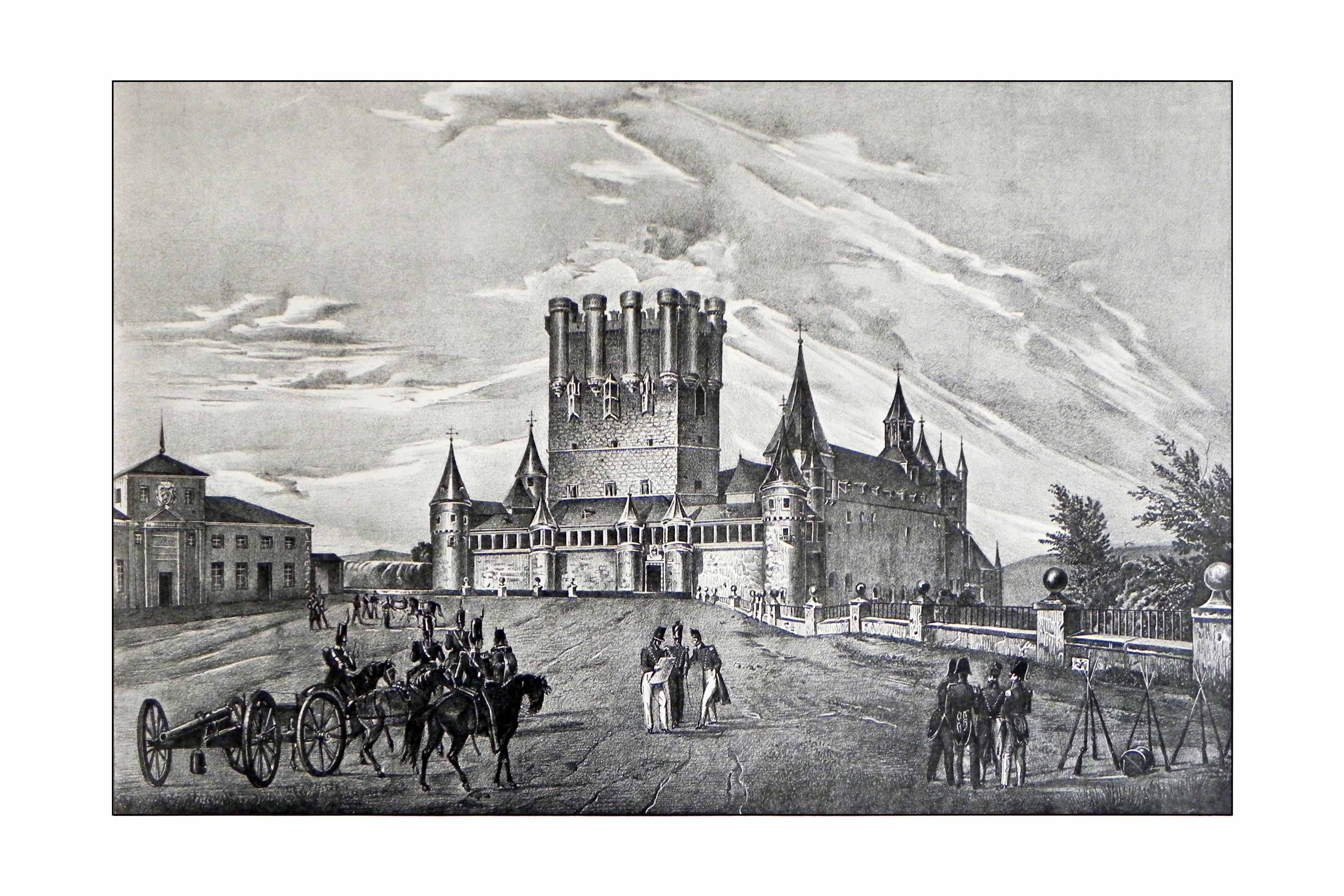 Alumnos del Real Colegio de Artillería de Segovia dado practicas en el Alcázar de Segovia